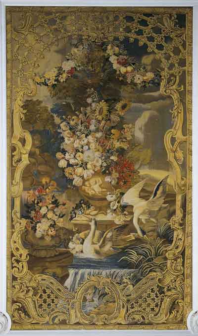 Шпалера "Лебеди" из Малой столовой Зимнего дворца. Неизвестный мастер. Петербургская шпалерная мануфактура. 1758 год. Повторение шпалеры 1734 года из Оружейной палаты .